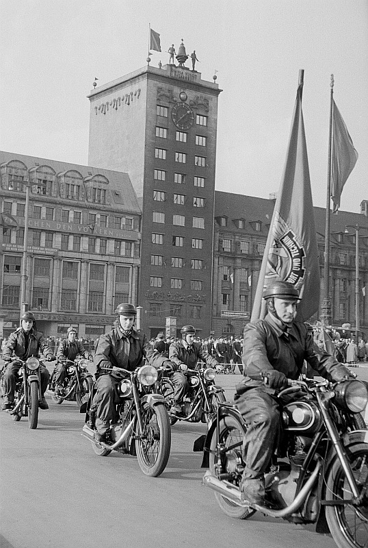 Original image description from the Deutsche Fotothek Motorradkolonne der Gesellschaft für Sport und Technik auf dem Karl-Marx-Platz anläßlich des 36. Jahrestages der Oktoberrevolution